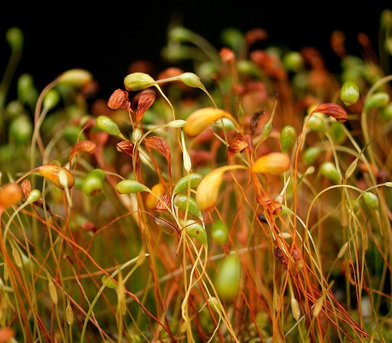 Funaria hygrometrica